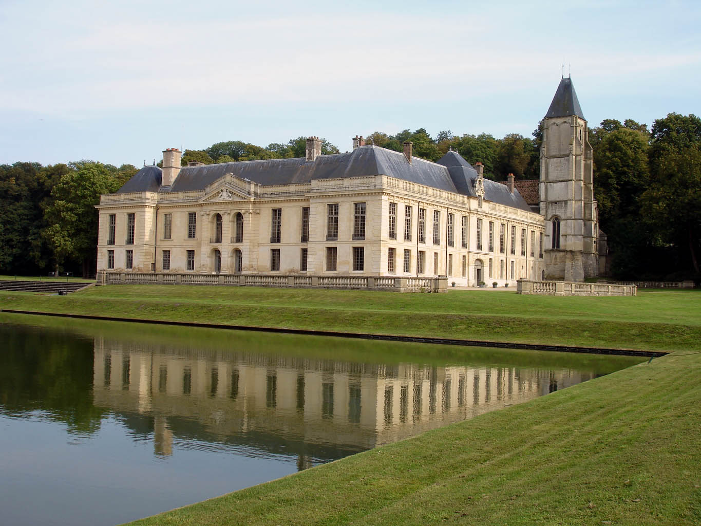 Le château de Méry-sur-Oise (Val-d'Oise), France Vue du nord-ouest sur parc, au fond à droite, l'église paroissiale Septembre 2007 Photo personnelle (own work) de Clicsouris